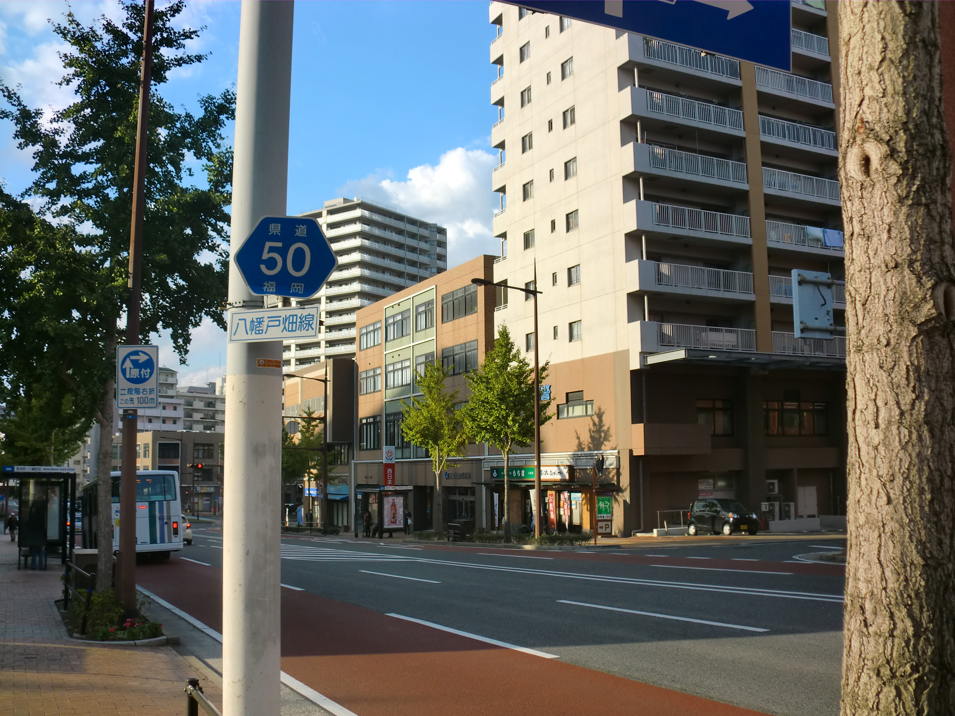 福岡県道50八幡戸畑線。八幡東区で撮影